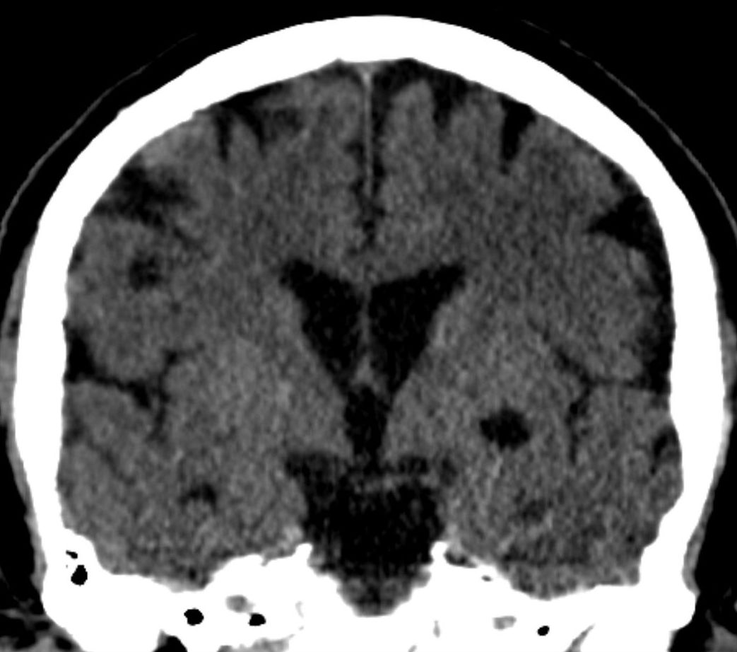 Zyste der Fissura choroidalis - Computertomographie coronar